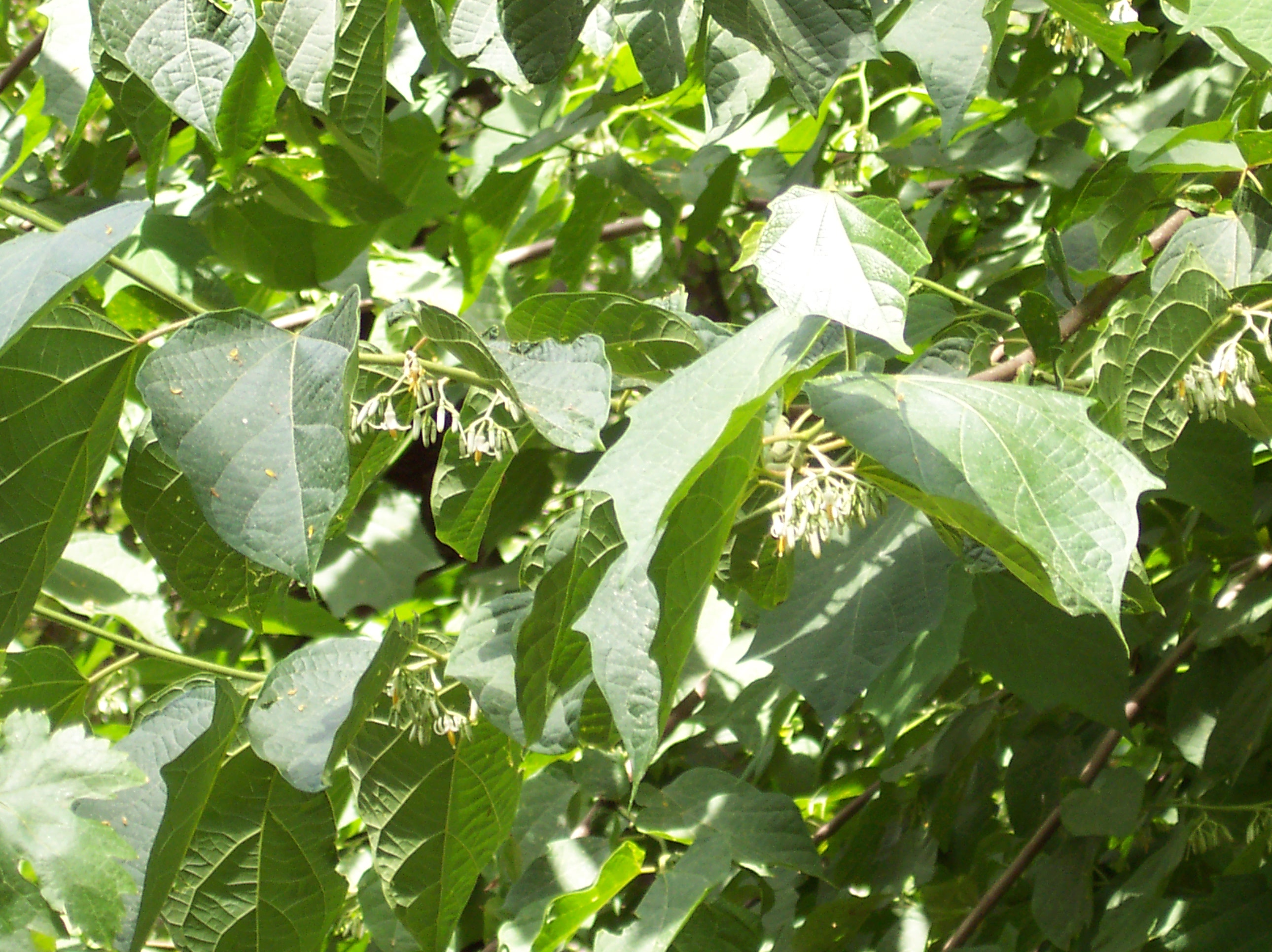 Alangium platanifolium. Real Jardín Botánico, Madrid.